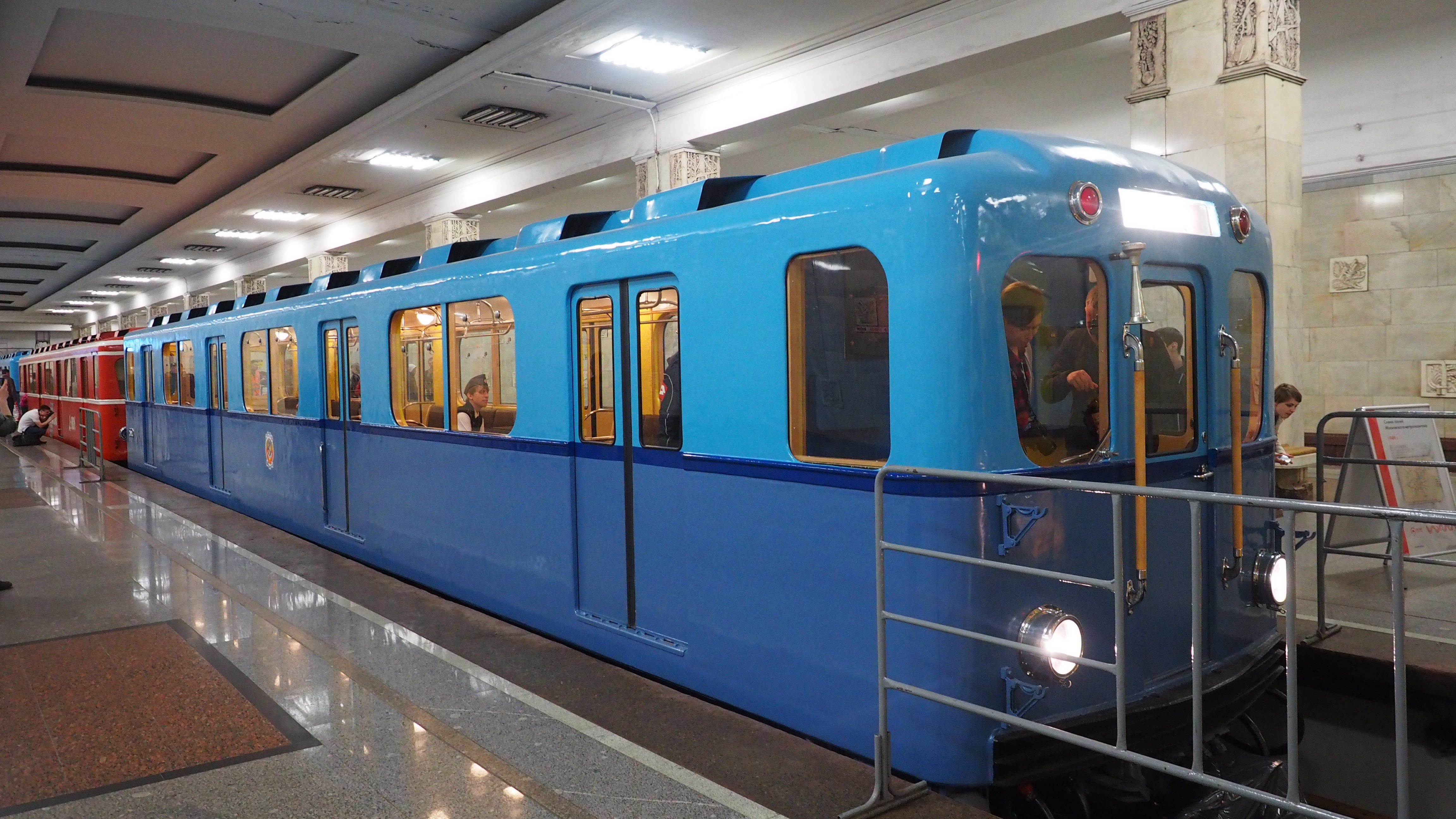 Музейный метровагон Г 530. Выставка подвижного состава и парад поездов к 80-летию Московского метрополитена 15 мая 2015 года. On May 15 and 16, 2015, Moscow Metro celebrated its 80th anniversary. For the first time, recently restored historical cars were exhibited at the siding track of Partizanskaya station. 15 и 16 мая 2015 в Москве отмечалось 80 лет Московскому метро. Впервые была устроена выставка исторических вагонов. Они были расставлены на 3 пути станции Партизанская.